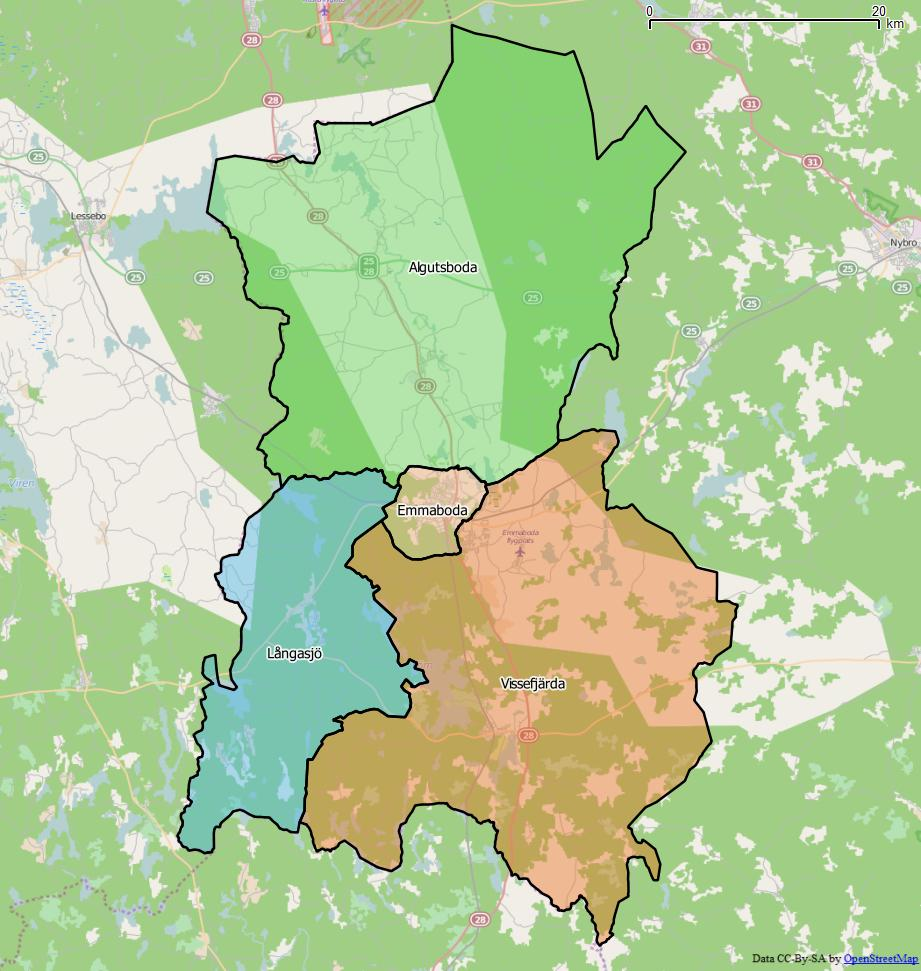 Distriktsindelningen i Emmaboda kommun